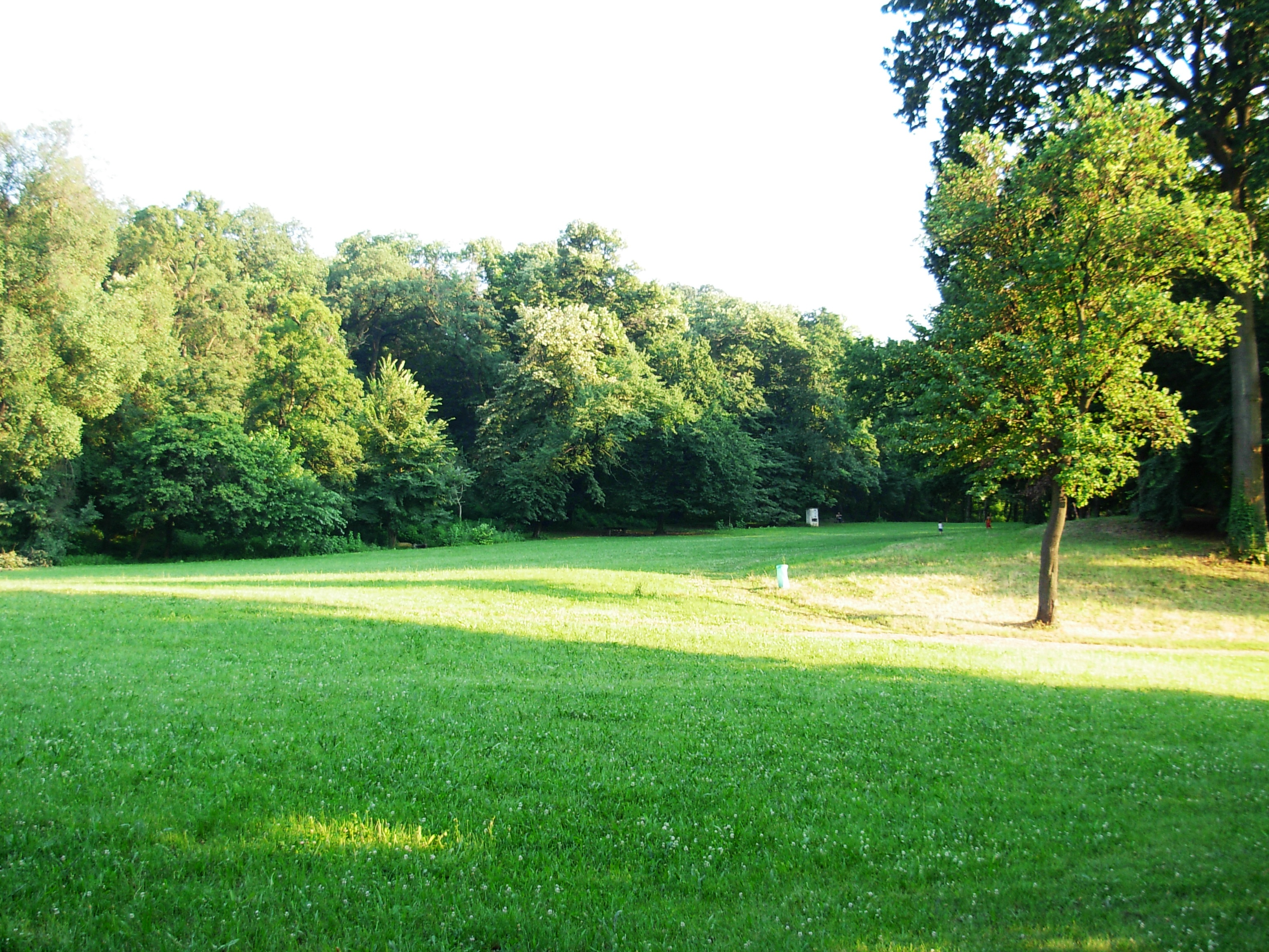 Kamenički park.